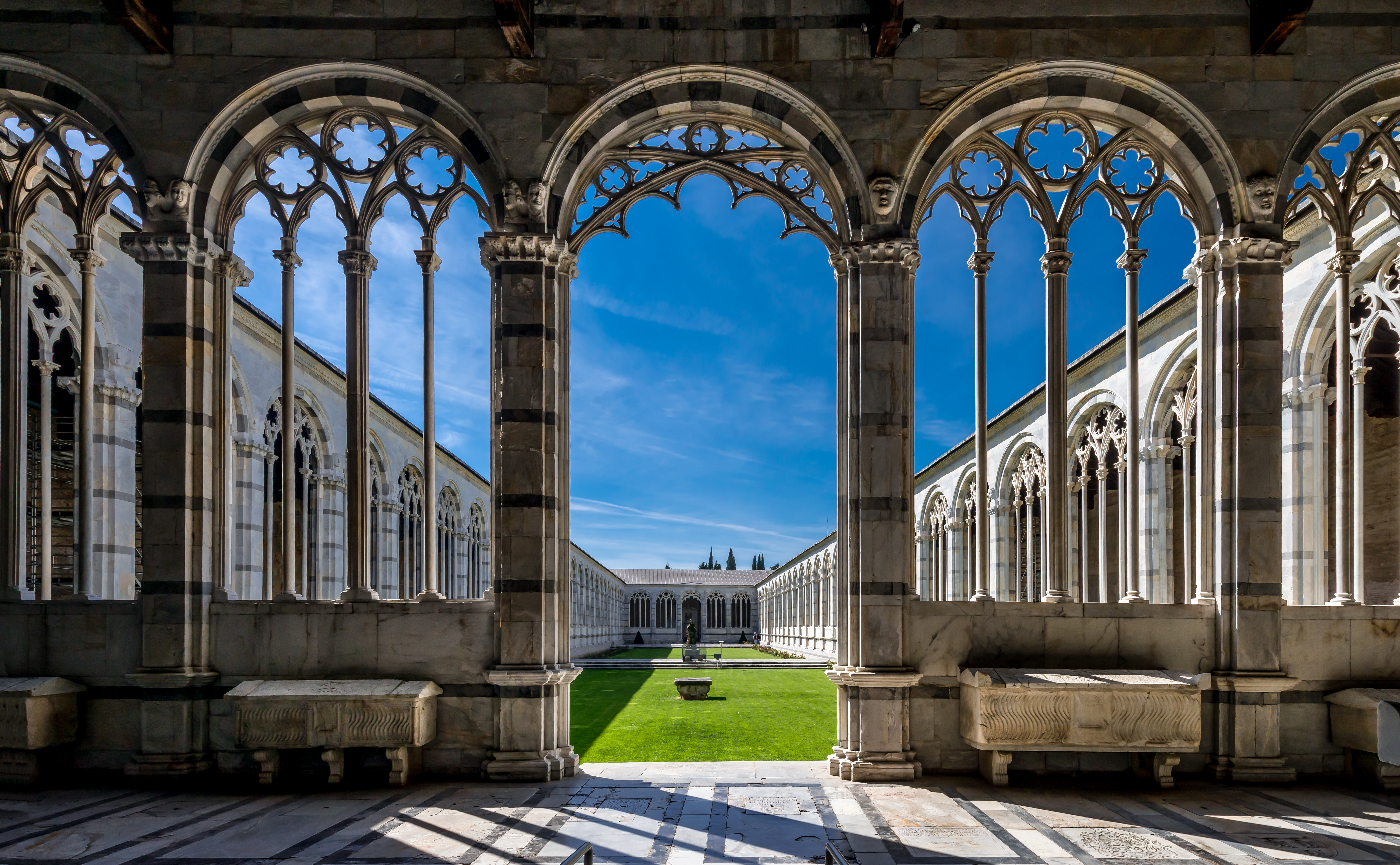 Interno del Camposanto Monumentale di Pisa